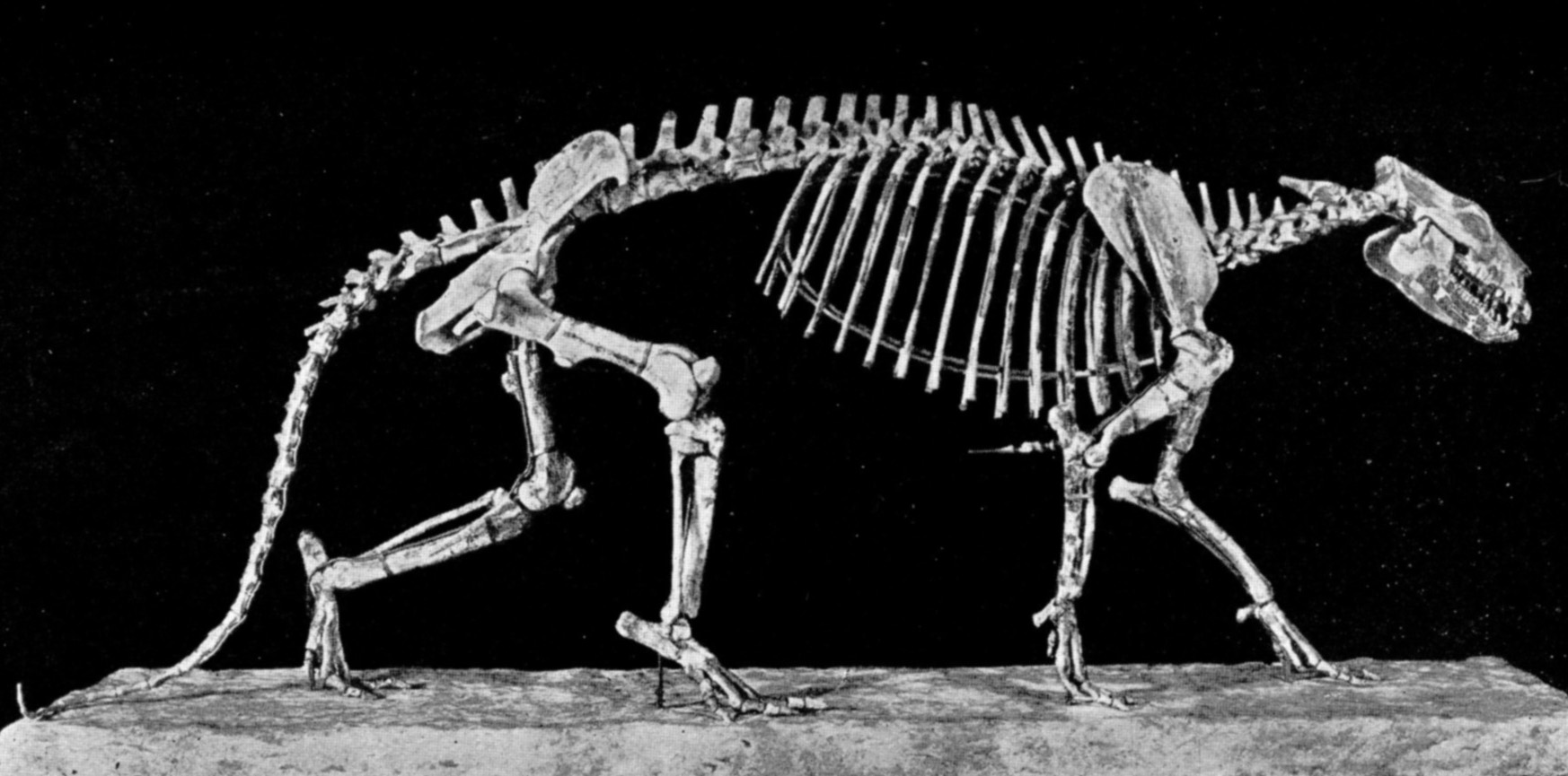 Phenacodus resartus skeleton.